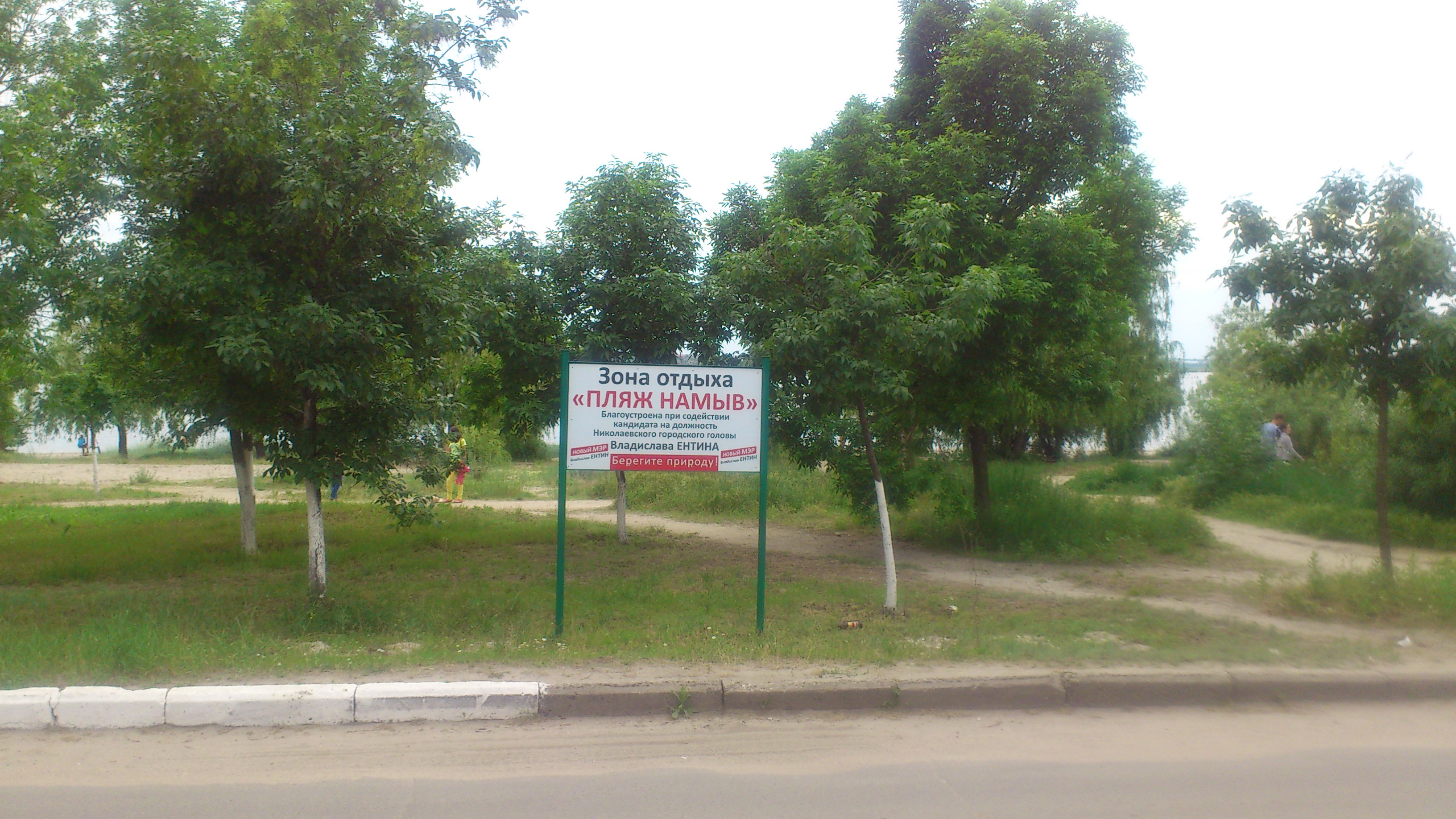 Пляж на Намиві у Миколаєві